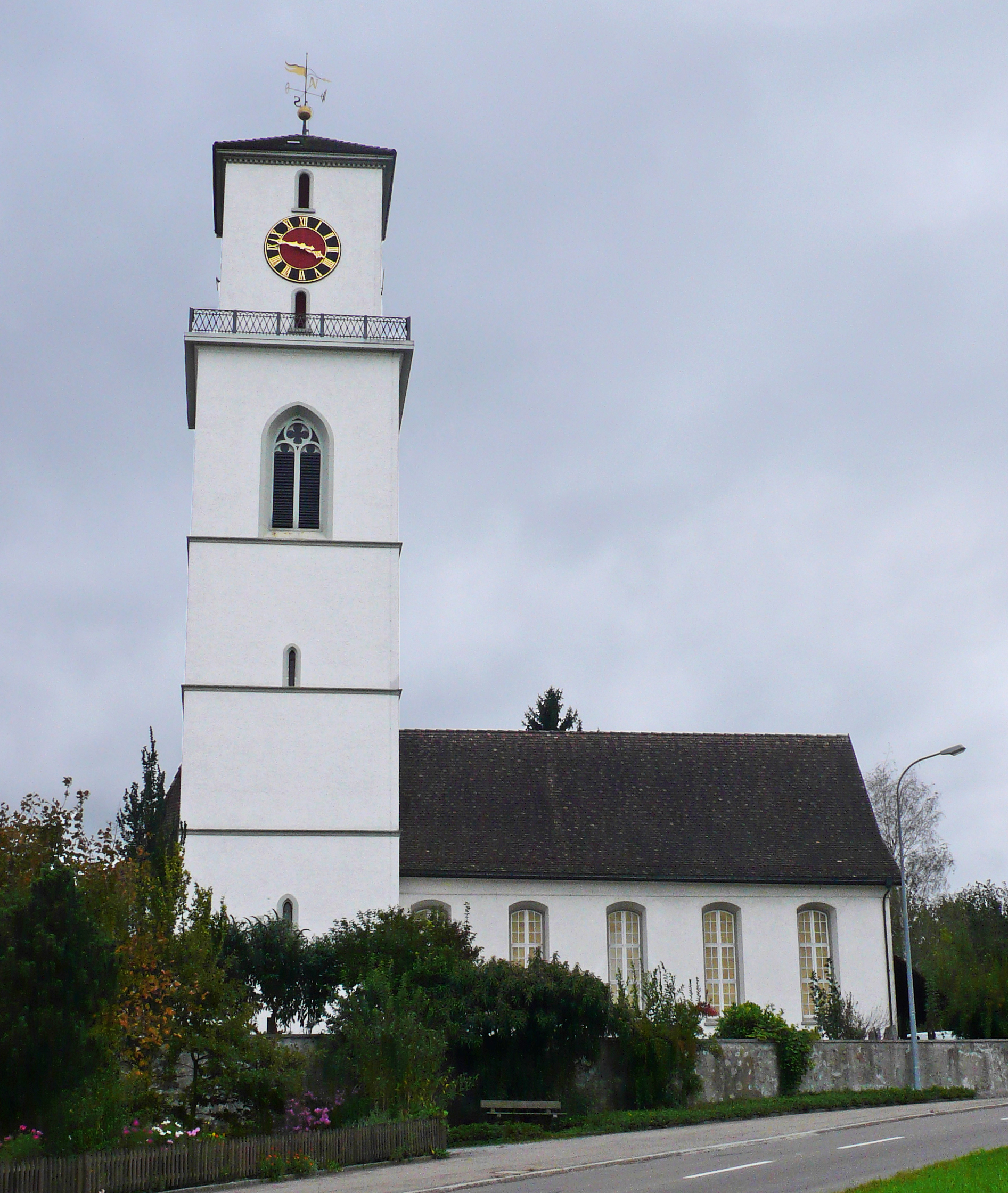 Paritätische Kirche, Güttingen.